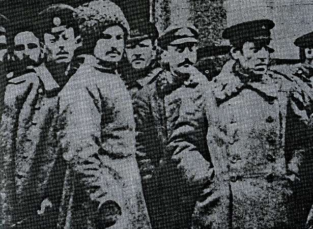 Symon Petlura among troops